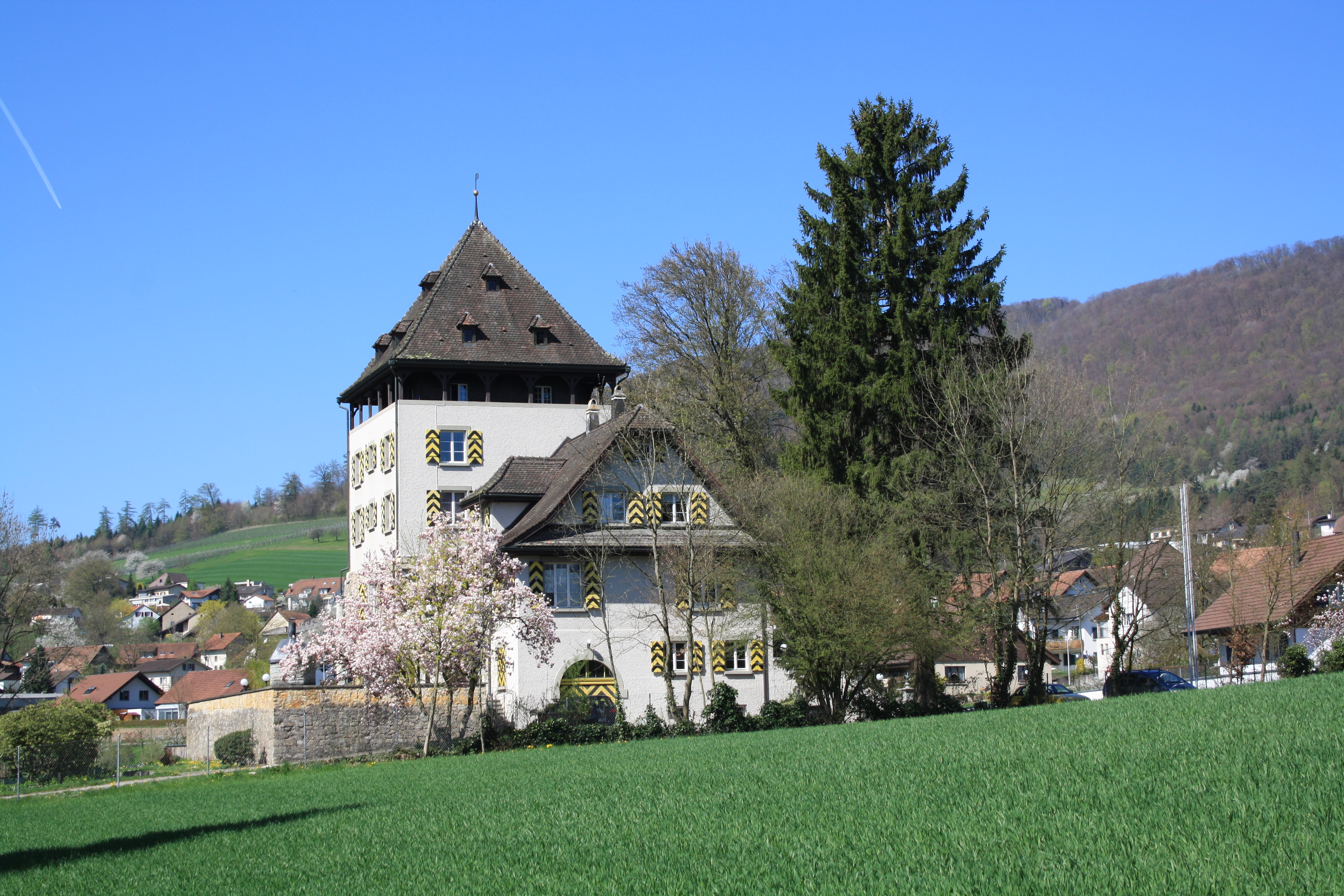 Schloss Auenstein